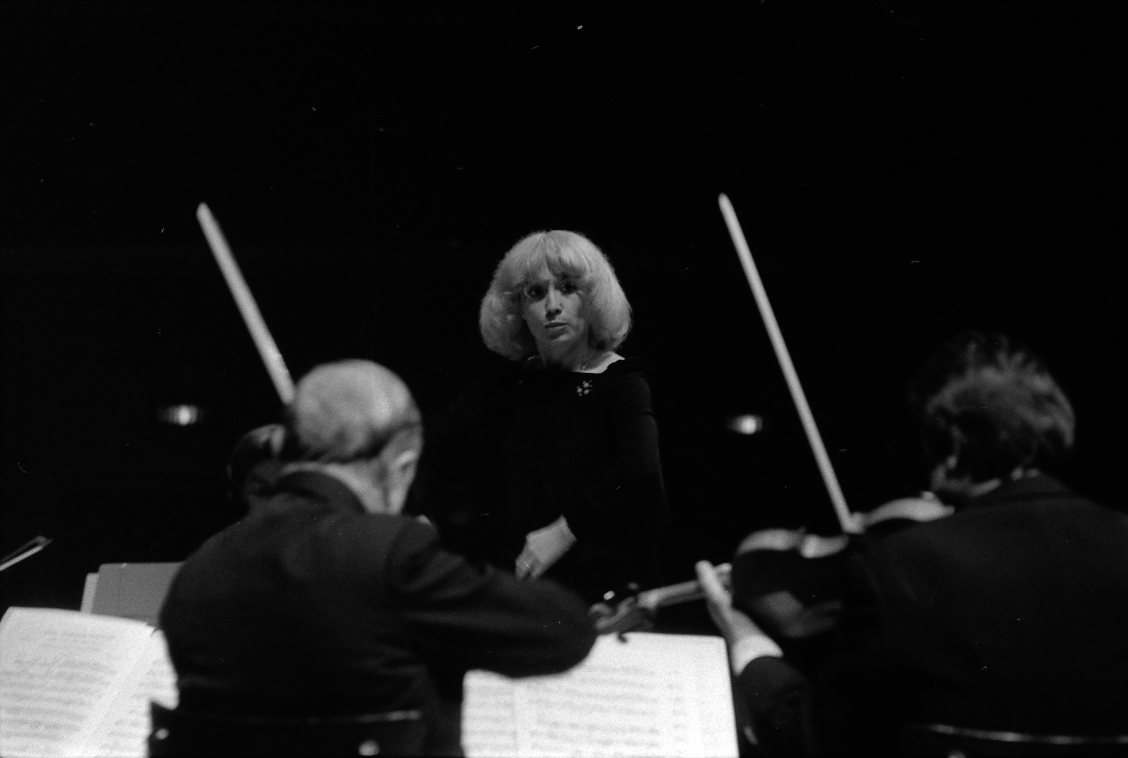 Pas de lieu. Le 14 juin 1973. Vue de Claude Manlay qui dirige l'Orchestre Auriacombe lors d'un concert. Observation: Premier concert de Claude Manlay, femme chef d'orchestre, avec l'orchestre de chambre Louis Auriacombe.